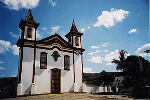 Esta é a igreja matriz de Conceição do Mato Dentro.